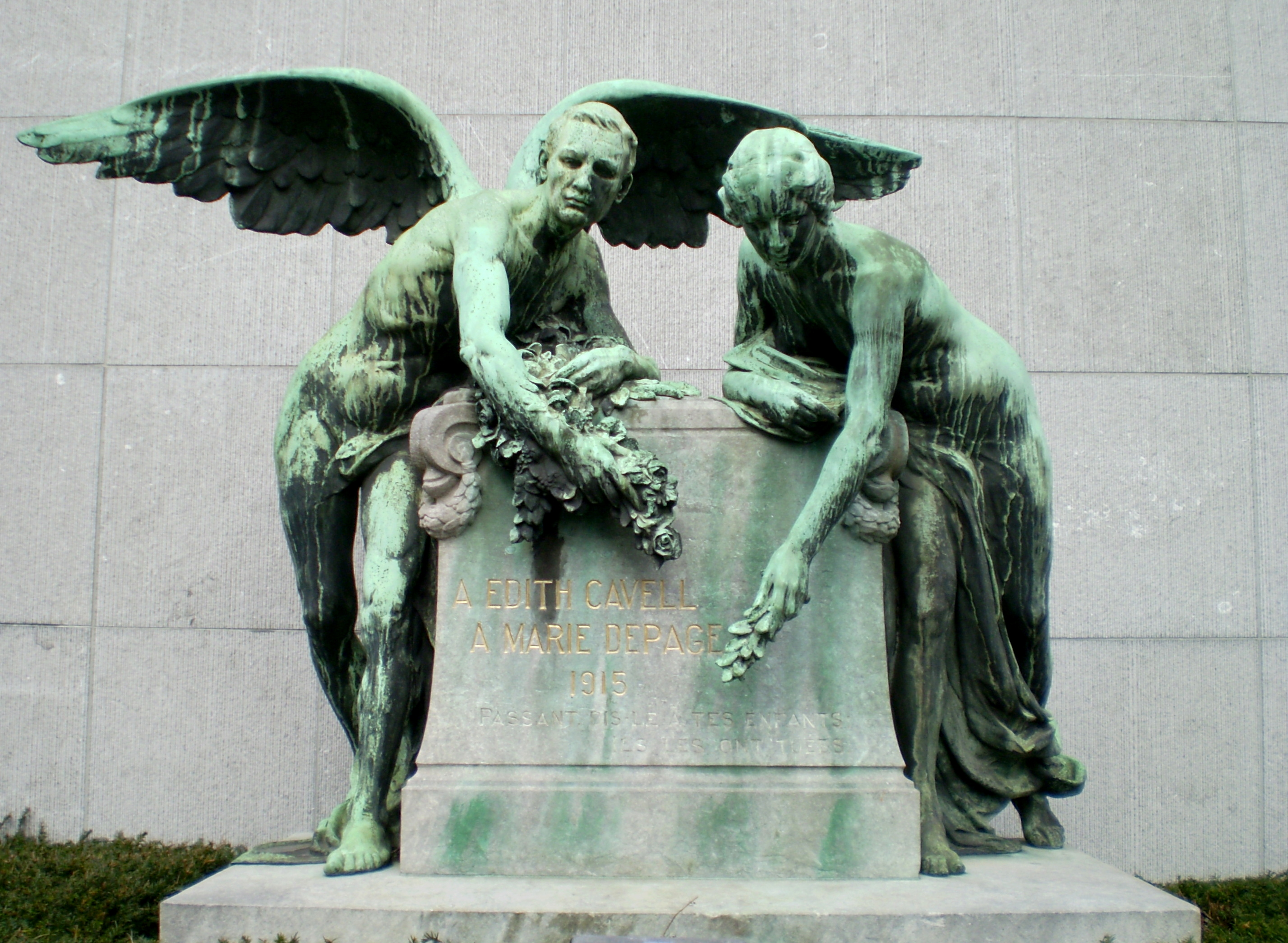 Monument en hommage à Édith Cavell et Marie Depage - Uccle (Bruxelles) - Sculpteur: Paul Du Bois, 1920